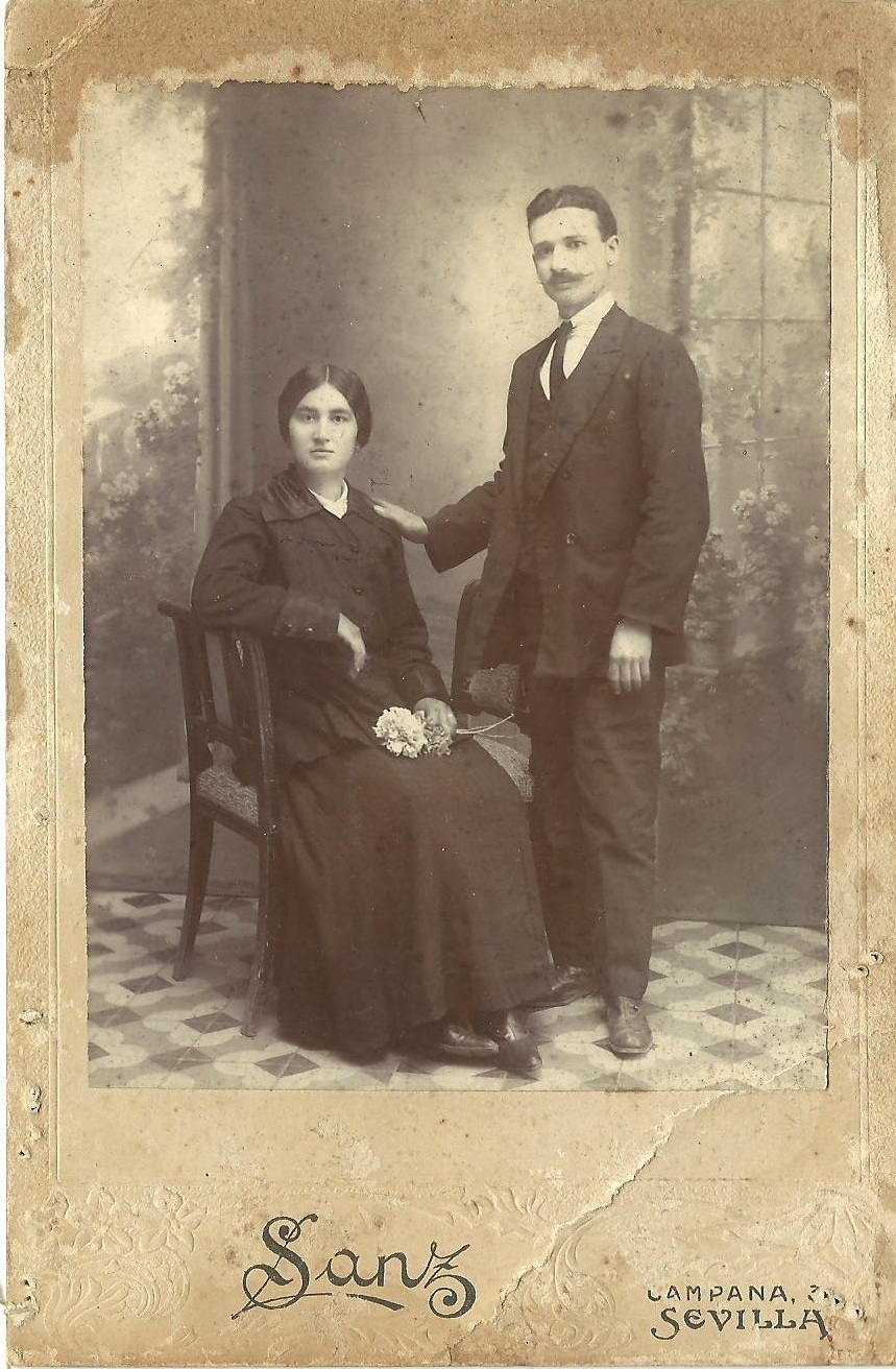 Una familia tipica de El Pedroso